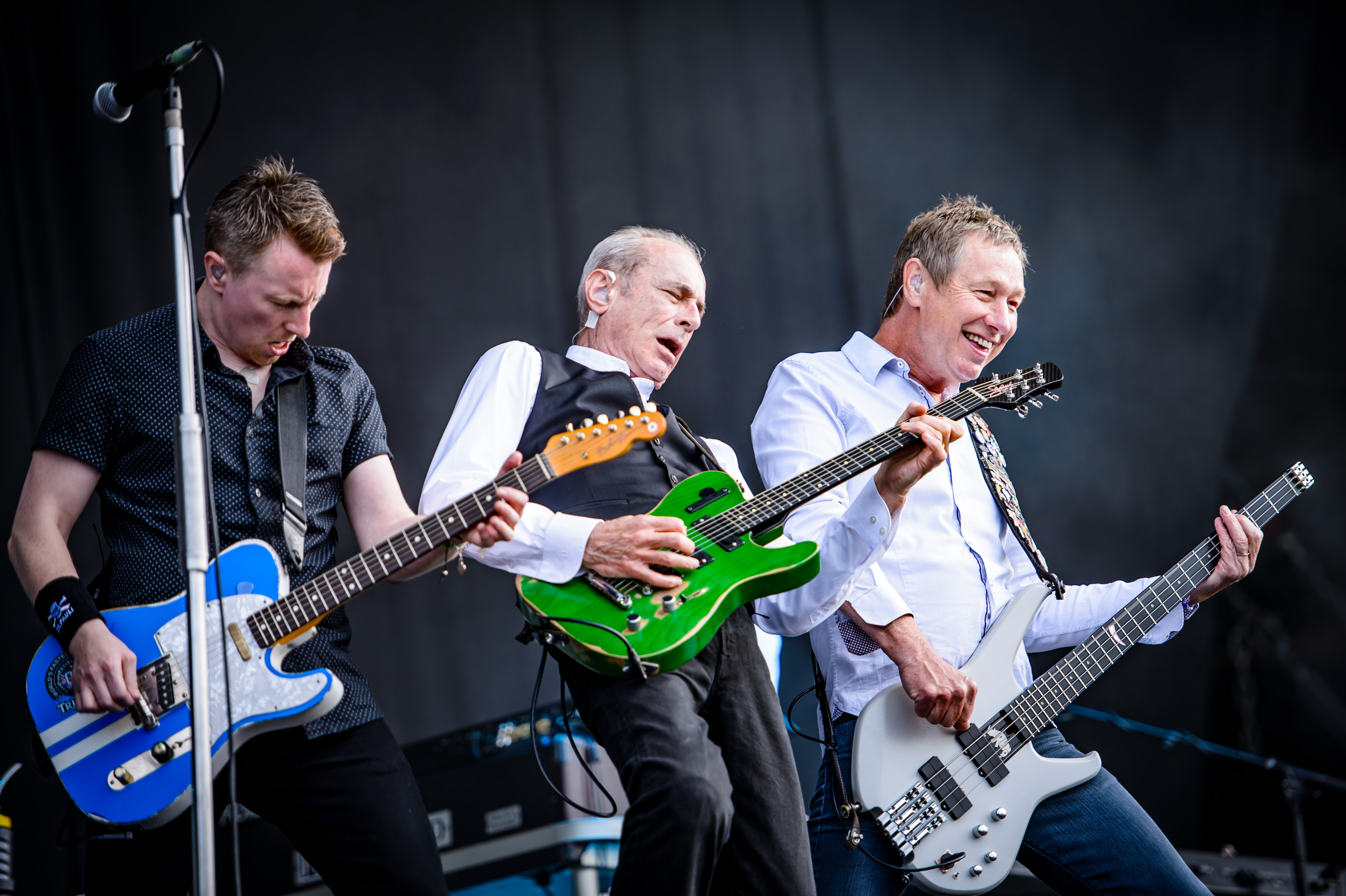 'Wacken Open Air 2017; Wacken': Status Quo'